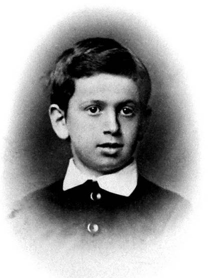 Лев Львович Толстой в 1878 году. Тула